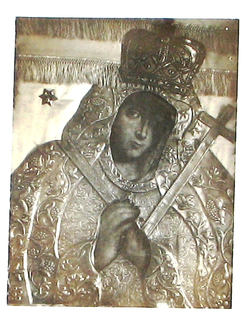 Фото Бучинської ікони 1938 року